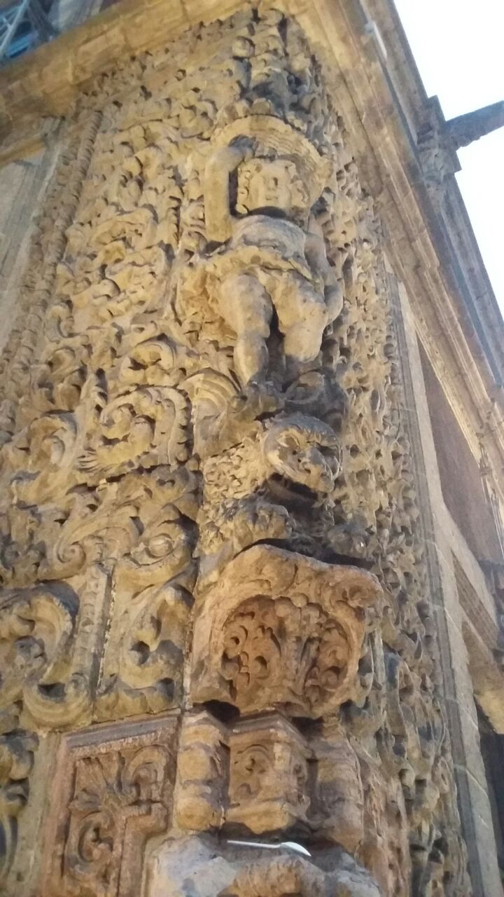 Esquina del Archivo Histórico de la Ciudad de México, en el que se aprecia a un niño sosteniendo una canasta de frutas y pisando a un león, Centro Histórico de la Ciudad de México.